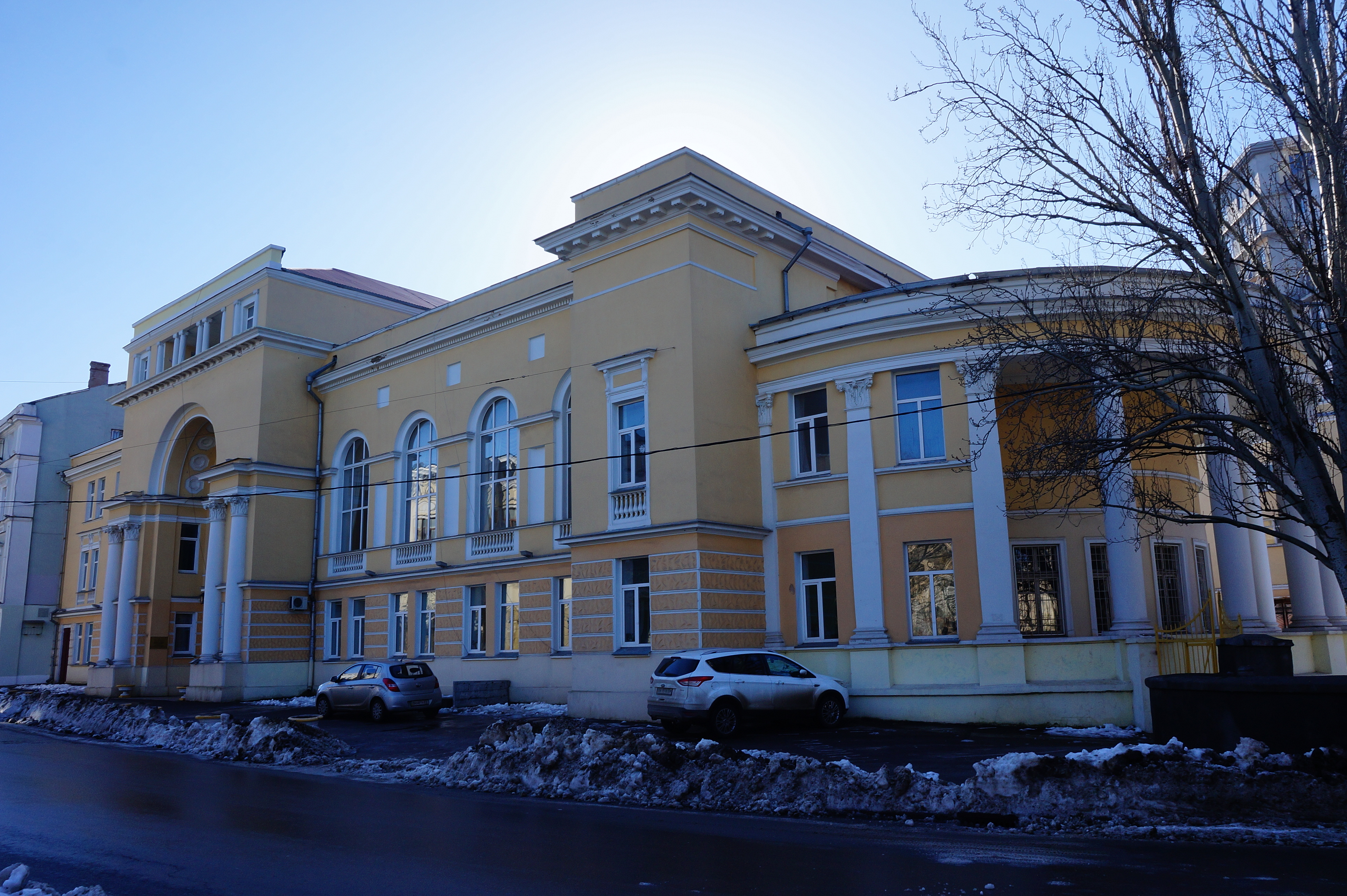 Будівля музичної школи ім. П.С.Столярського, у якому працював П.С. Столярський - професор, Одеса, вул. Сабанєїв Міст, 1